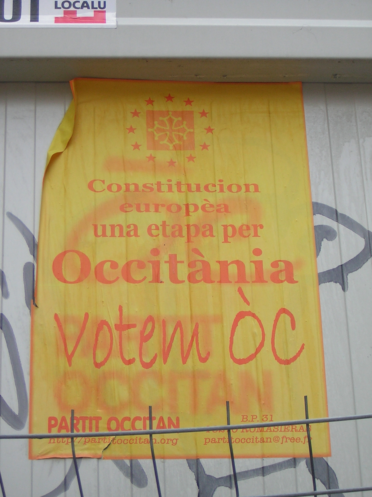 Cartel del Partit Occitan pidiendo el sí (òc) en el referendum del proyecto de constitución europea de 2005. Foto tomada el el centro de Toulouse.